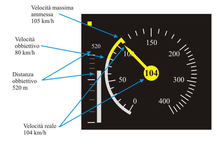 Segnali Ferroviari